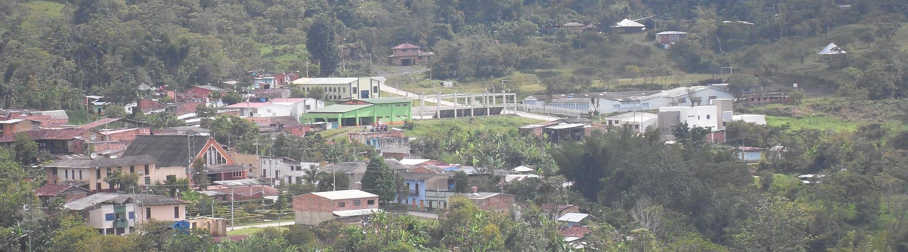 panoramica